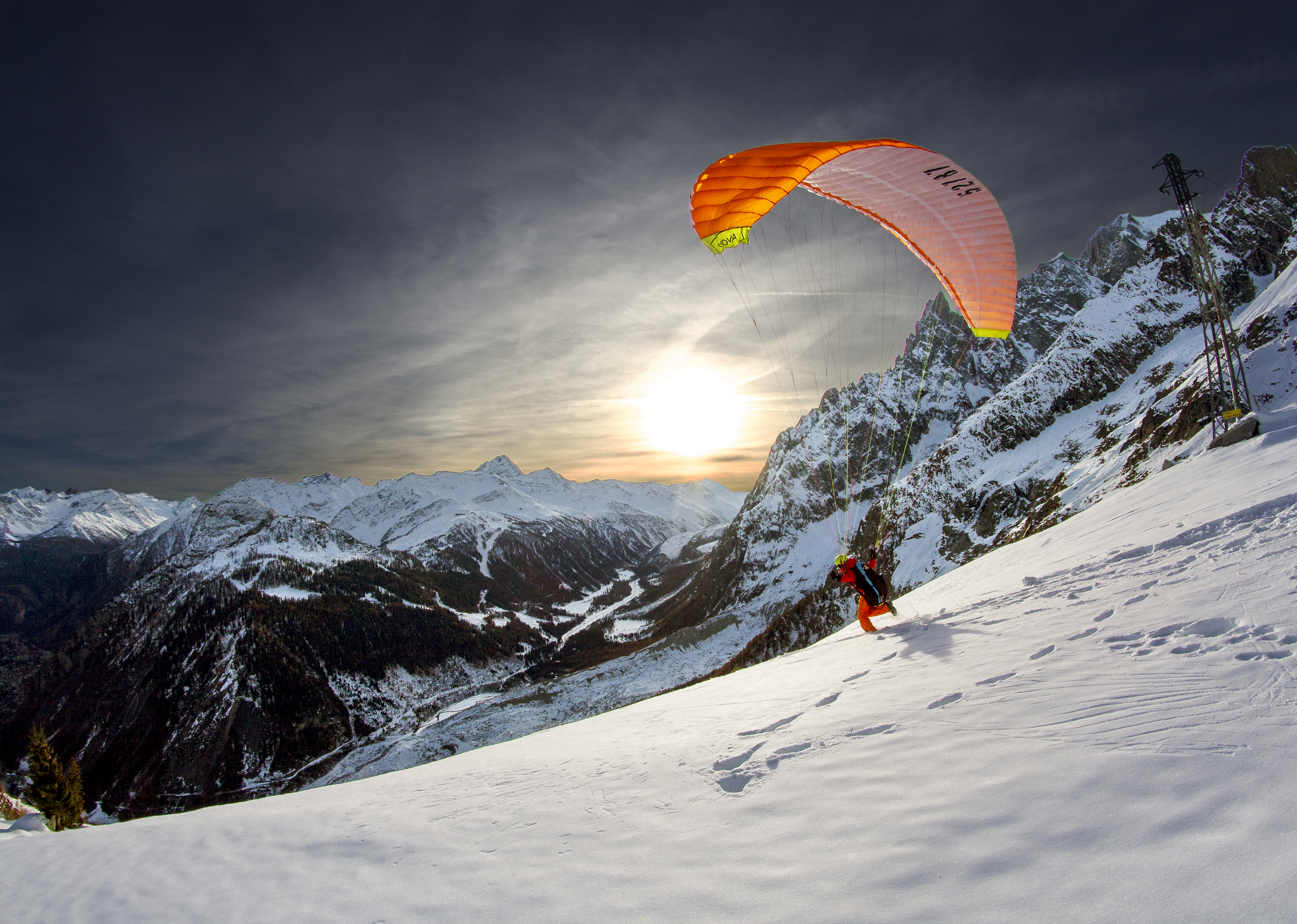 Ambienti Glaciali del Monte Bianco (Q49966280)